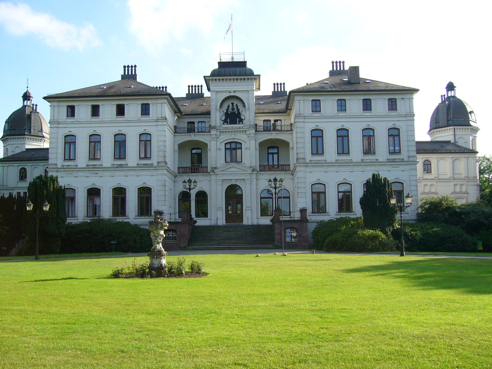 Landeskulturzentrum Schleswig-Holstein – Schloß Salzau